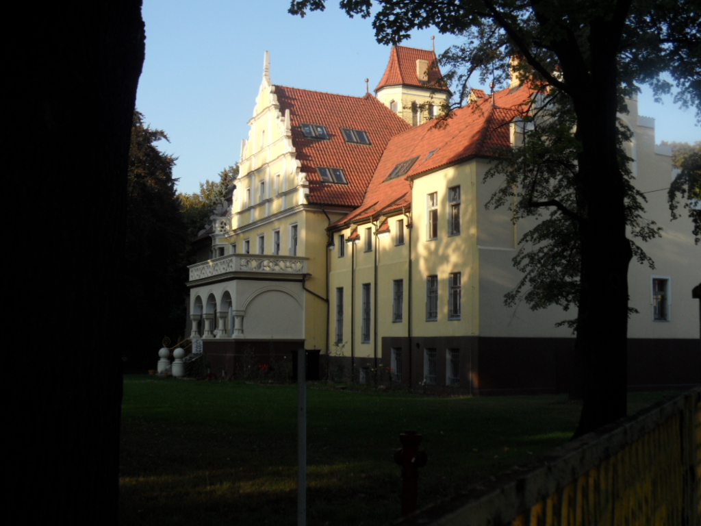 Pałac z parkiem w Ornontowicach (zabytek nr rejestr. A/1278/81)